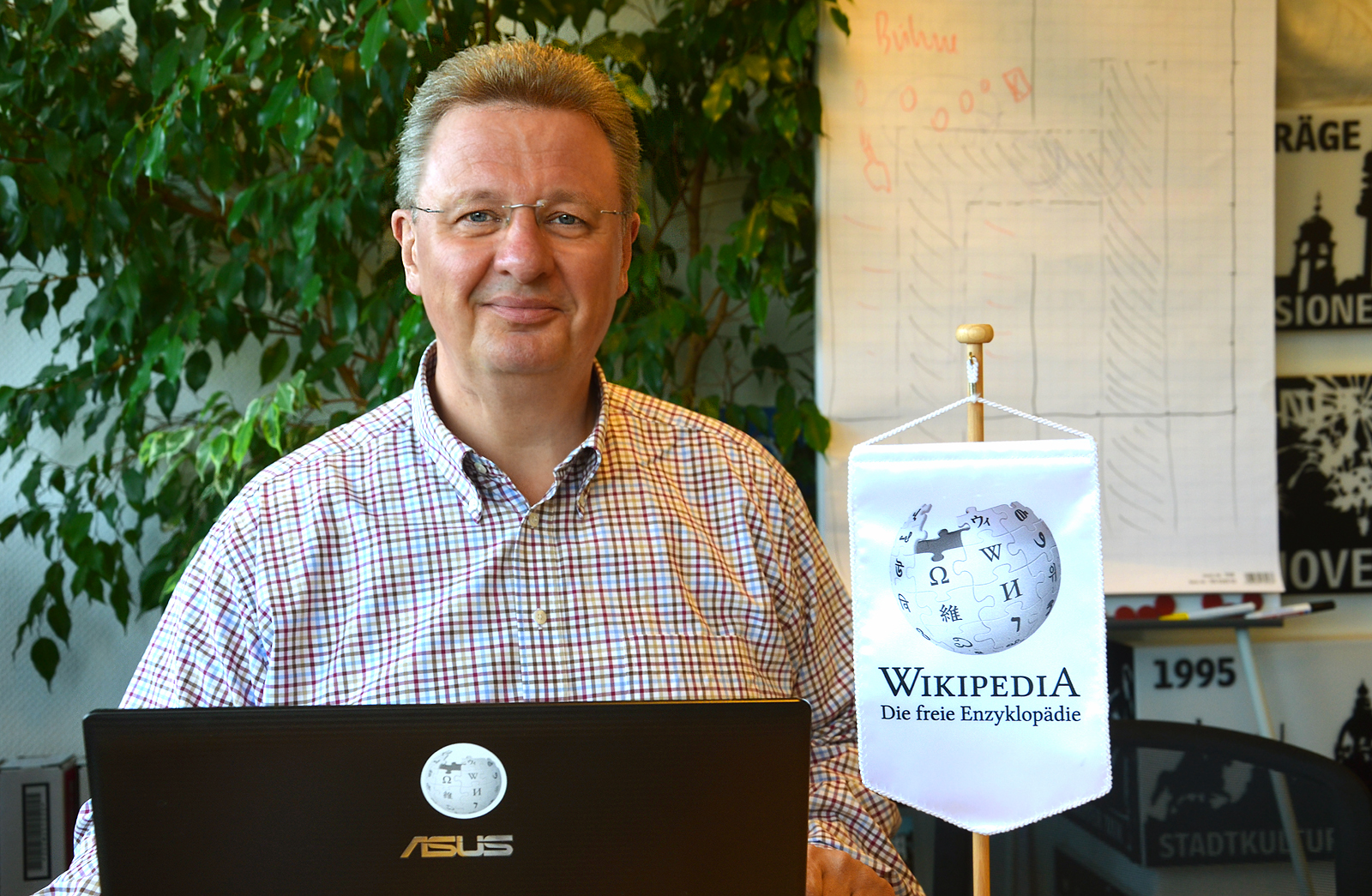 Bei seinem Besuch im Wikipedia-Büro Hannover meldete sich Thomas Thomson, Vorsitzender des Vereins Freundeskreis Knabenchor Hannover e.V., gleich mit seinem guten Namen online bei Wikipedia an sowie zugleich bei allen Schwesterprojekten der global aufgestellten, vielsprachigen und allen Menschen offenstehenden Stiftung Wikimedia Foundation ...